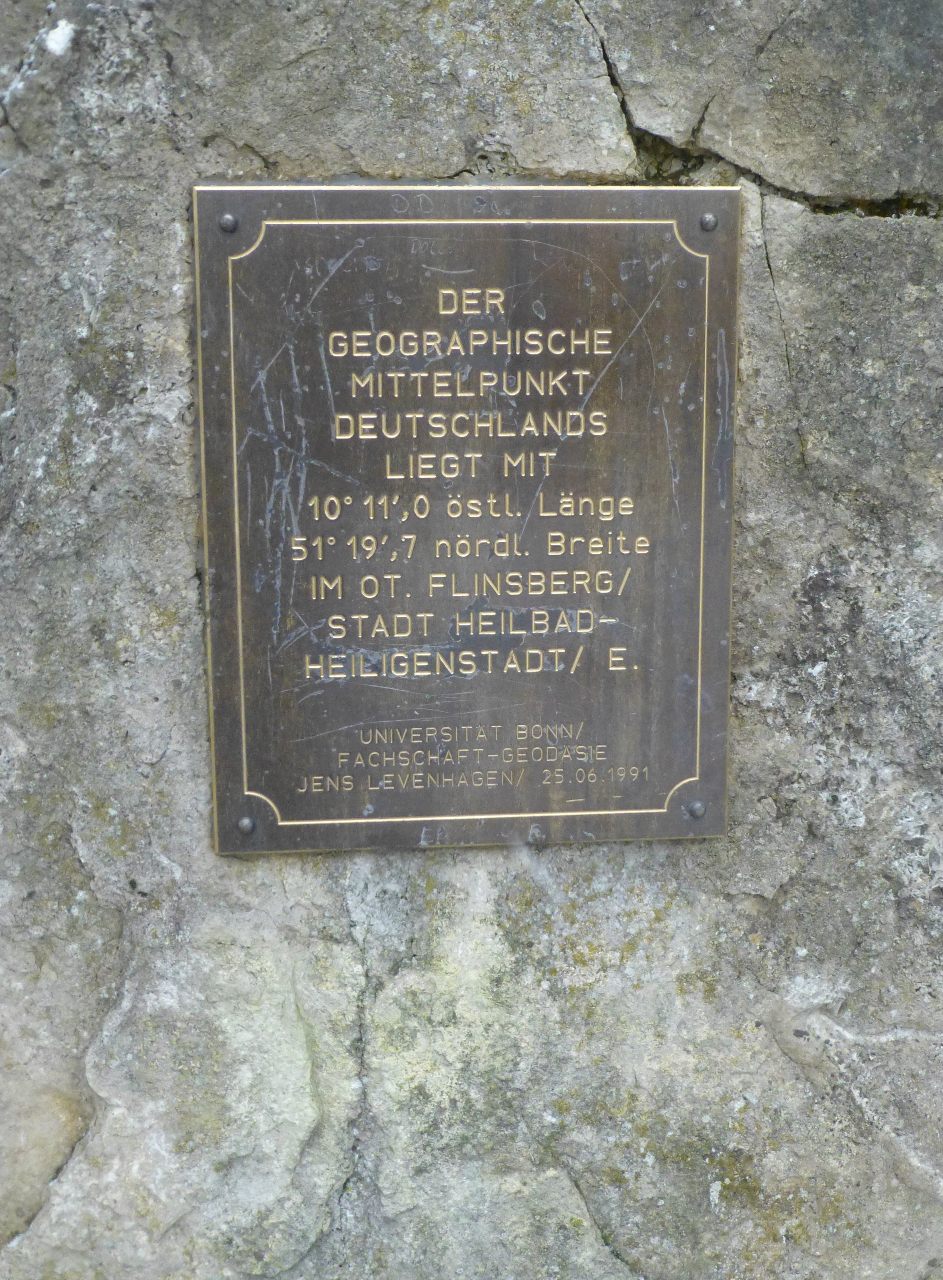 Tafel am Mittelpunkt bei Flinsberg